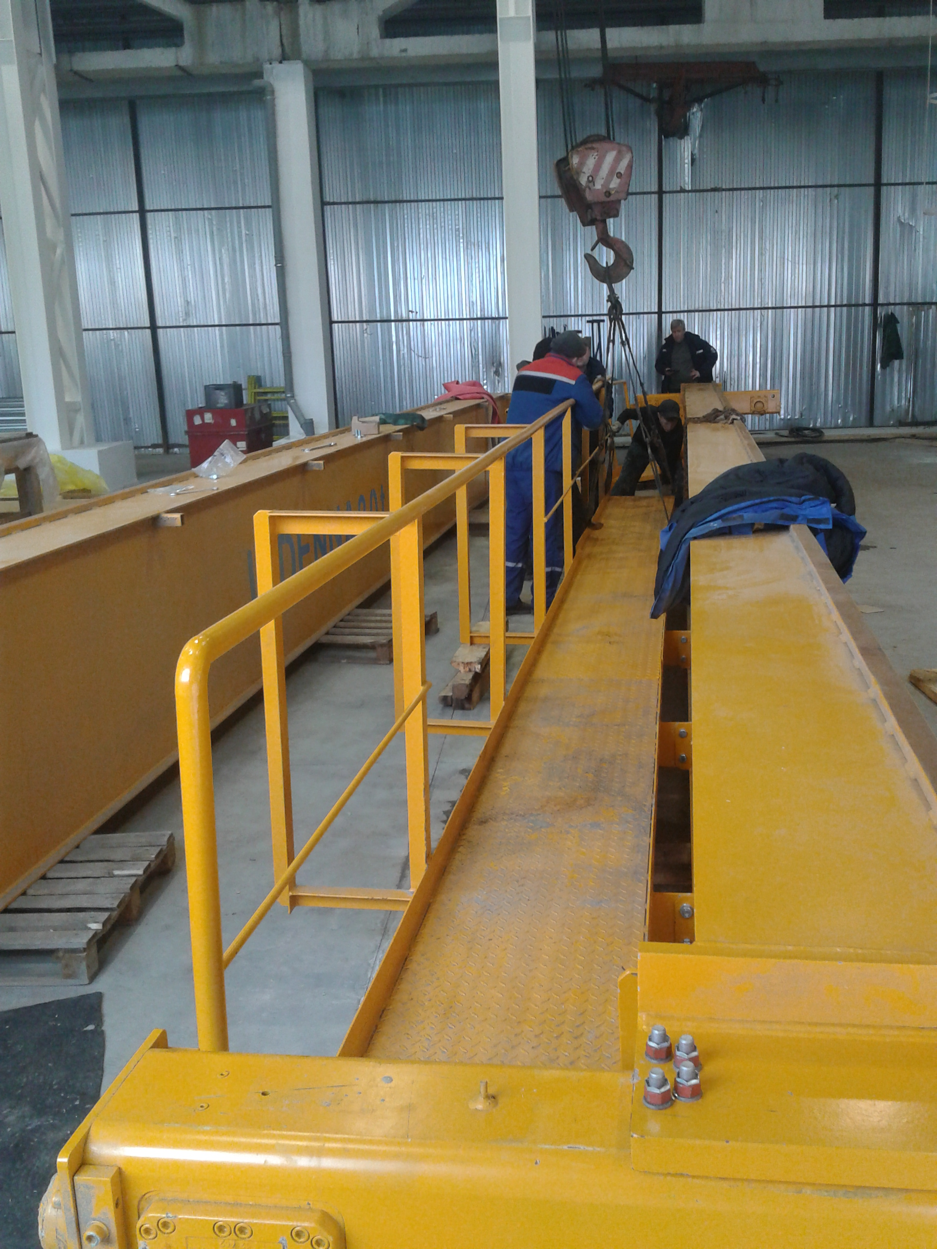 servisni podest/platforma za vzdževanje dvigala, vir 30t+30t dvonosilčno dvigalo swf, Russia/Kaluga.